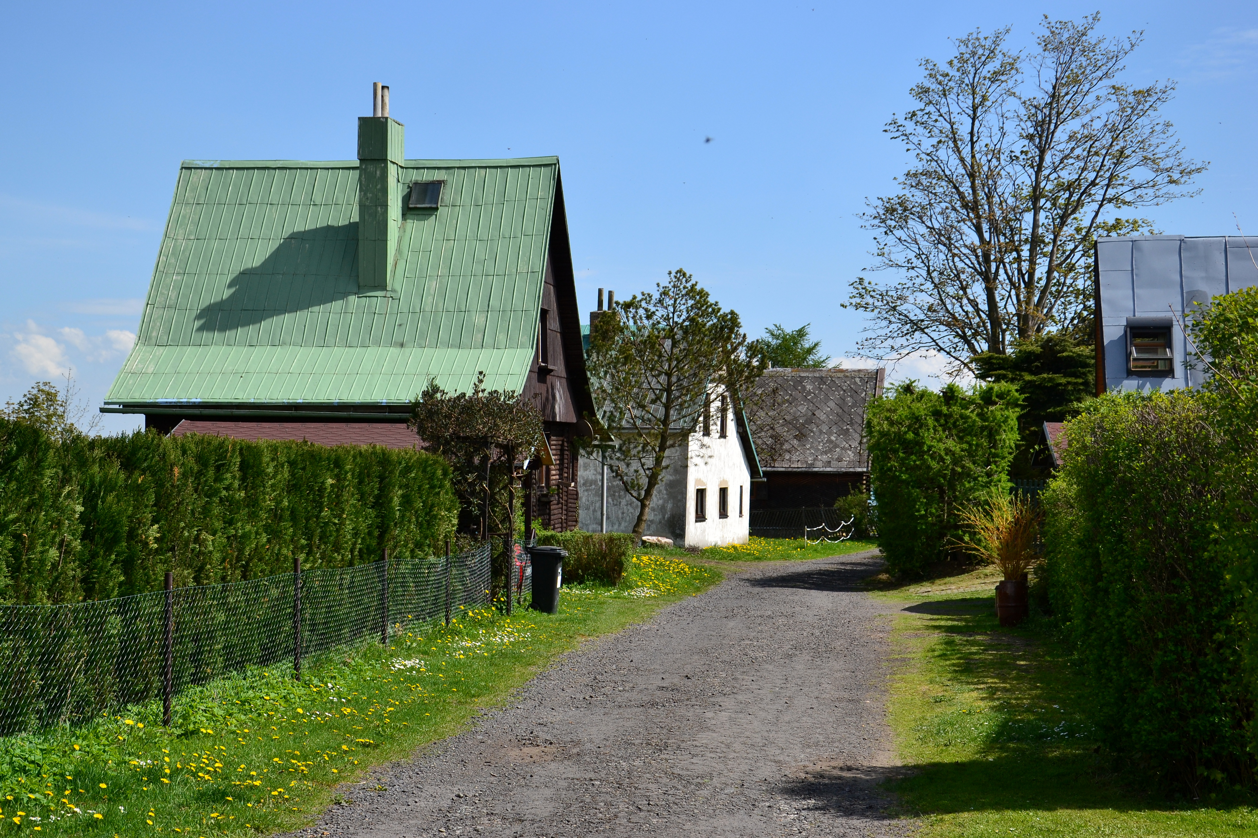 Chaty v Nové Vísce